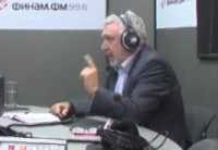 Валерий Зубов в эфире Финам ФМ